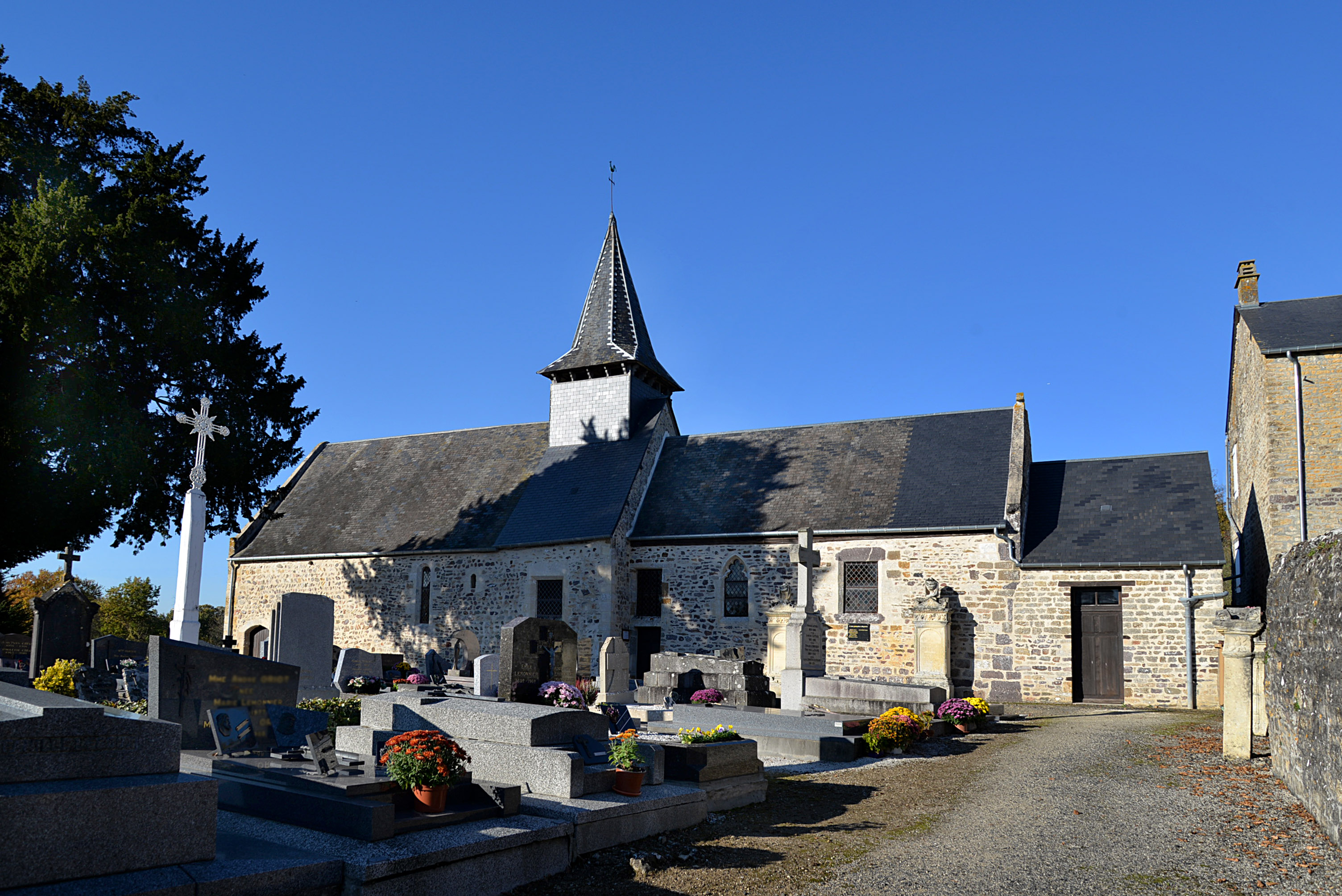 Le Vey (Calvados)